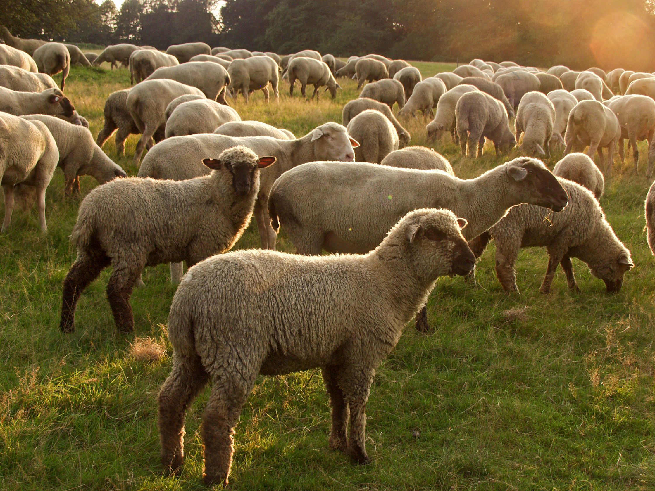 Schafherde auf Scharpenacken zur Erhaltung der Magerwiesenstandorte